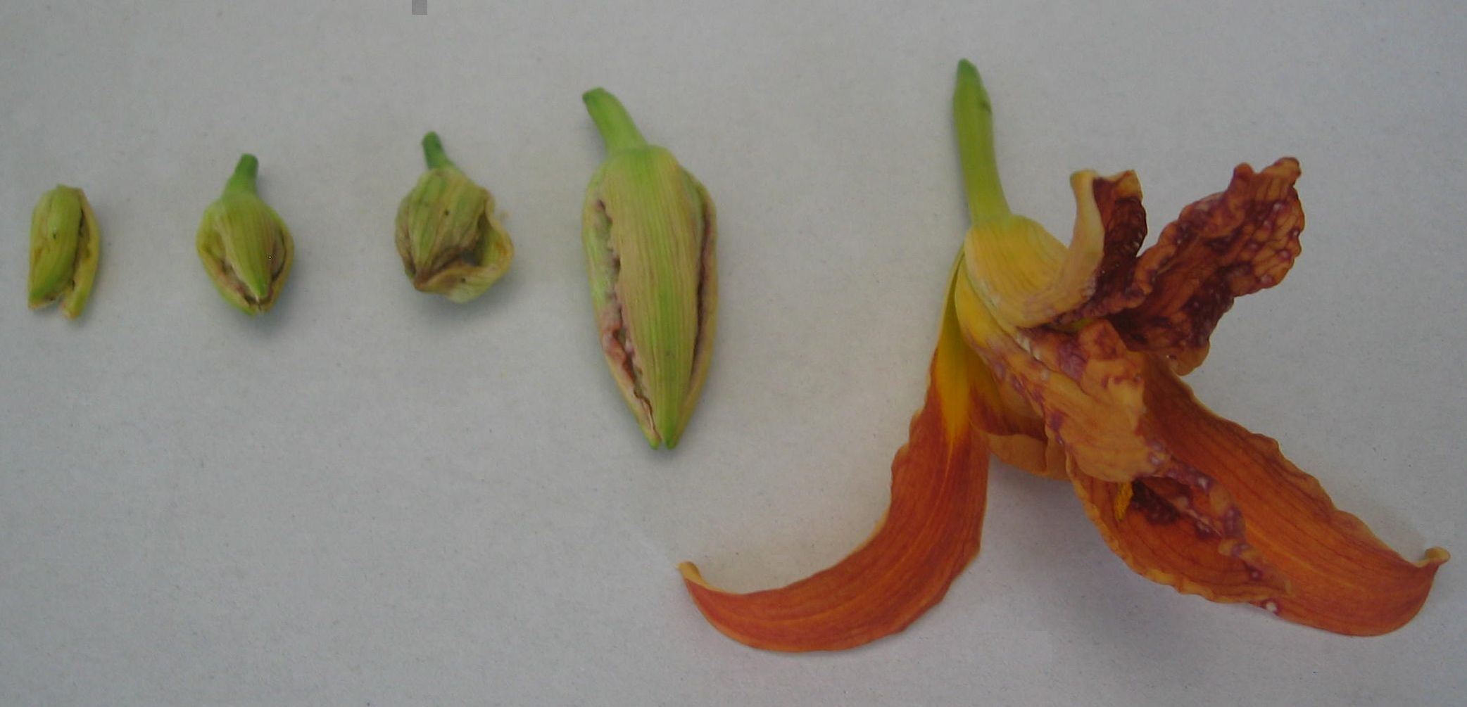 Gelbrote Taglilie (Hemerocallis fulva), Blüten befallen mit Hemerocallis-Gallmücke